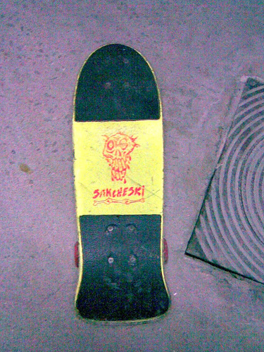 Sancheski skateboard